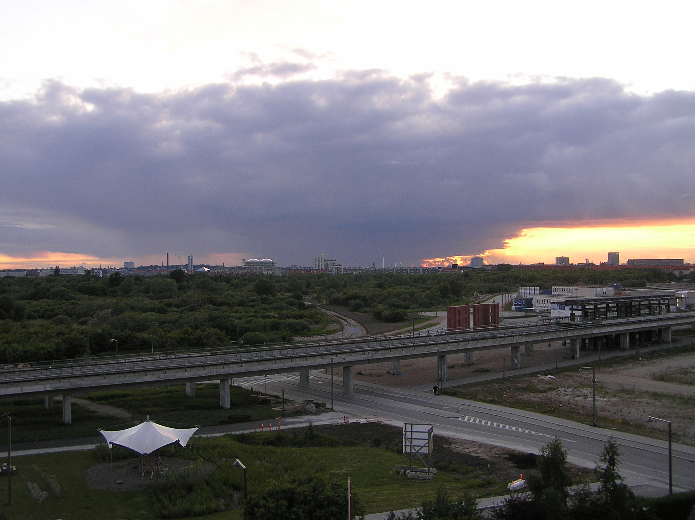 Amager Fælled at Copenhagen metro station DR Byen.